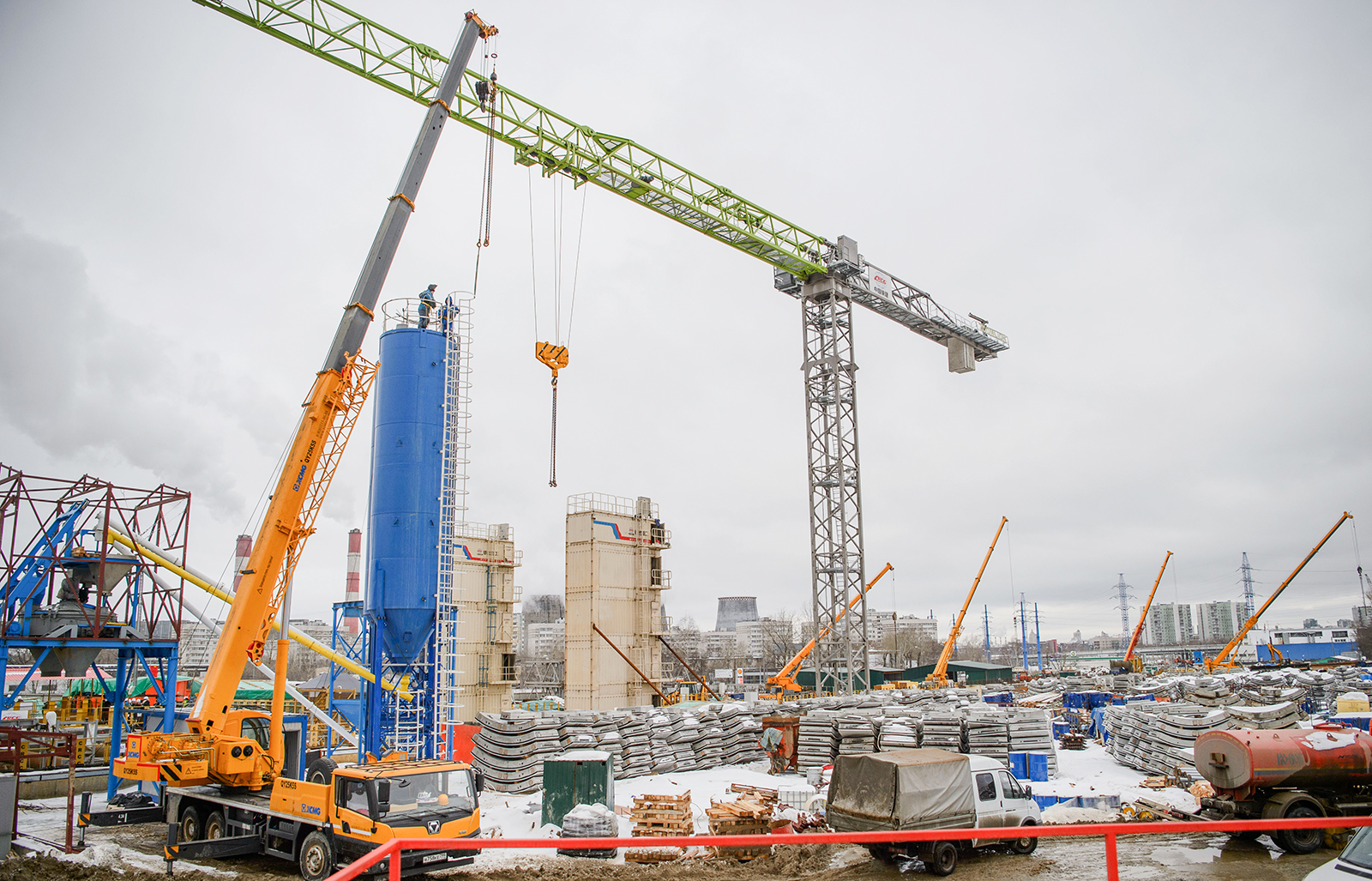 Осмотр хода строительства станции «Аминьевское шоссе» Большой кольцевой линии Московского метрополитена